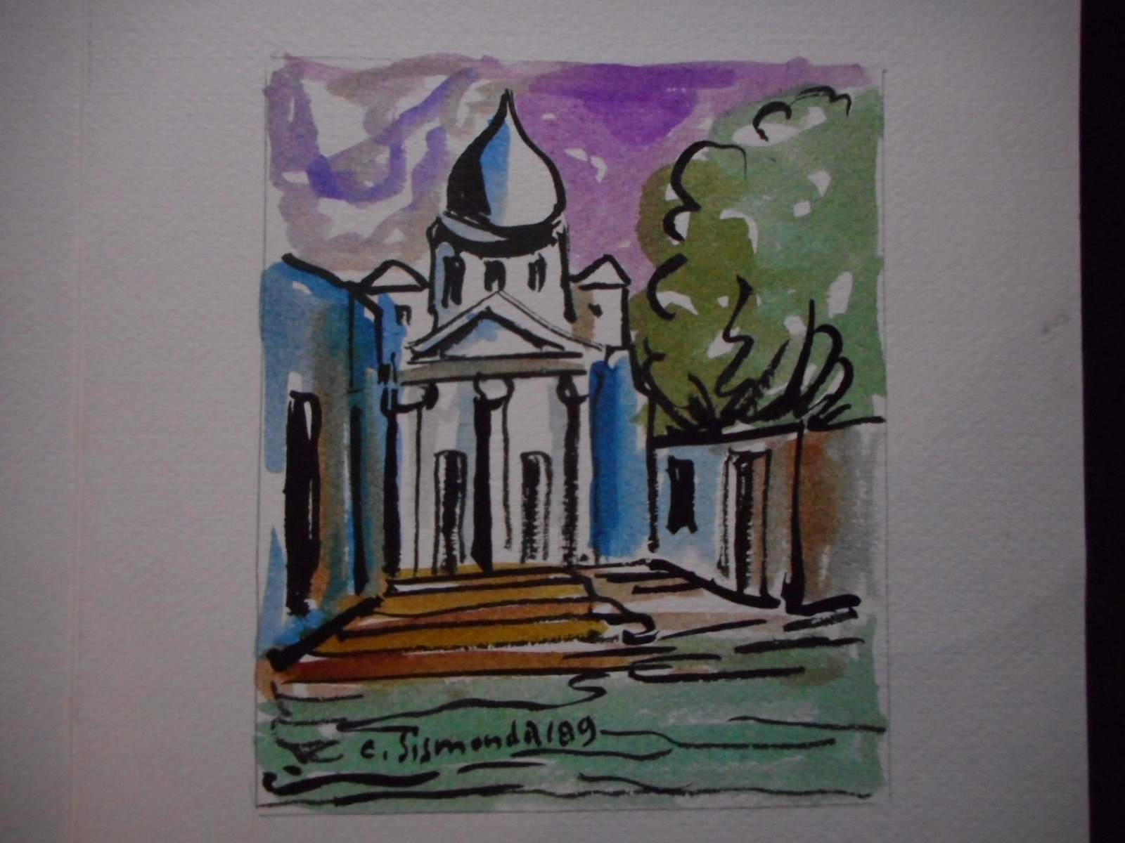 Acquarello di Carlo Sismonda